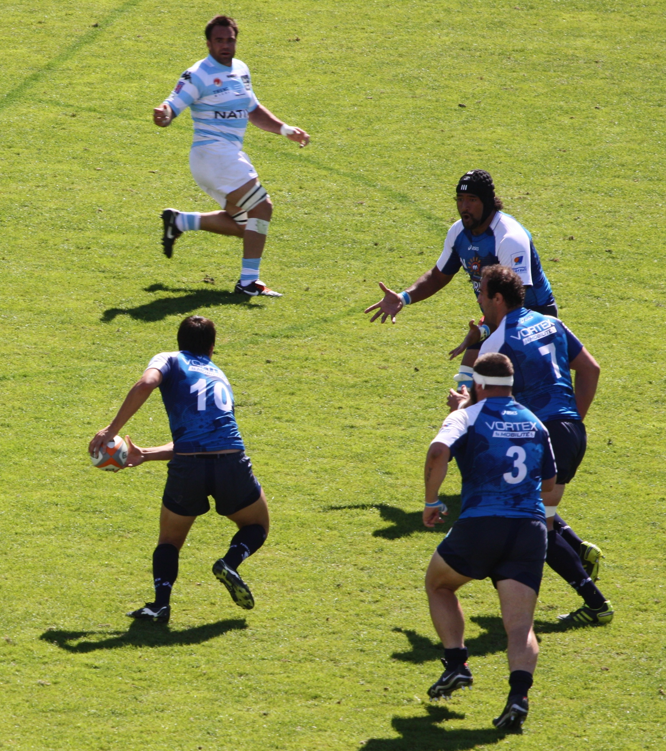 Demi-finale du Top 14 2010-2011 Racing Métro 92 - Montpellier au Stade vélodrome de Marseille